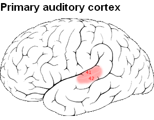 Primarna slušna moždana kora.